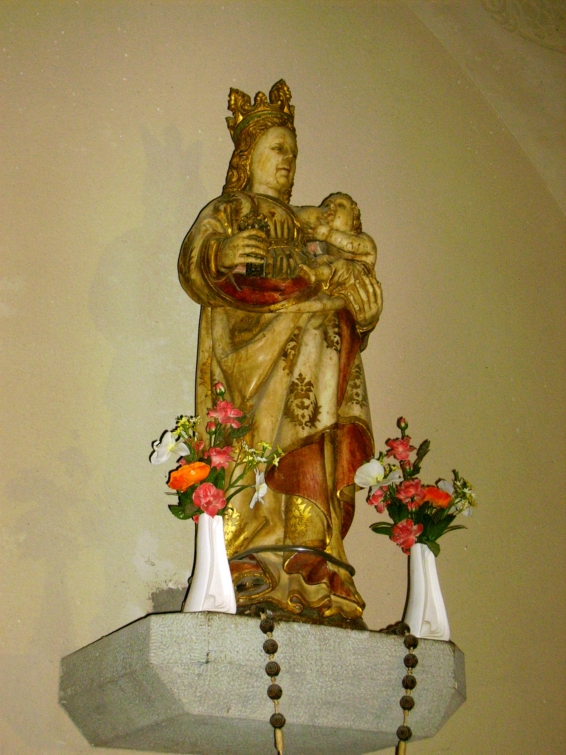 Santuari de la Mare de Déu del Far (Susqueda)